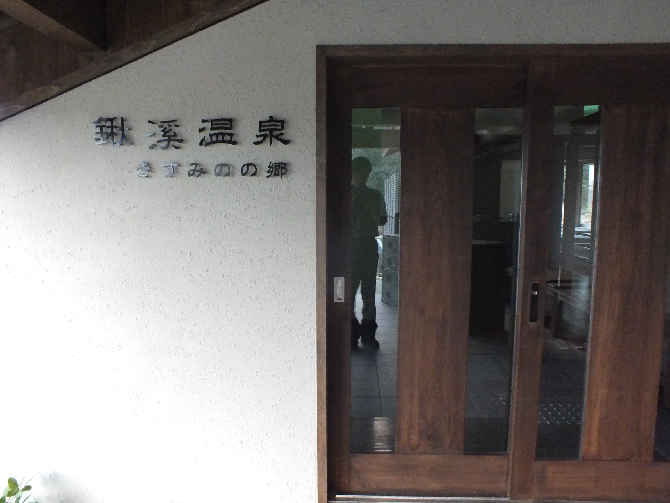 2018-03-29 Kuwatani-onsen 鍬渓温泉新棟建設中